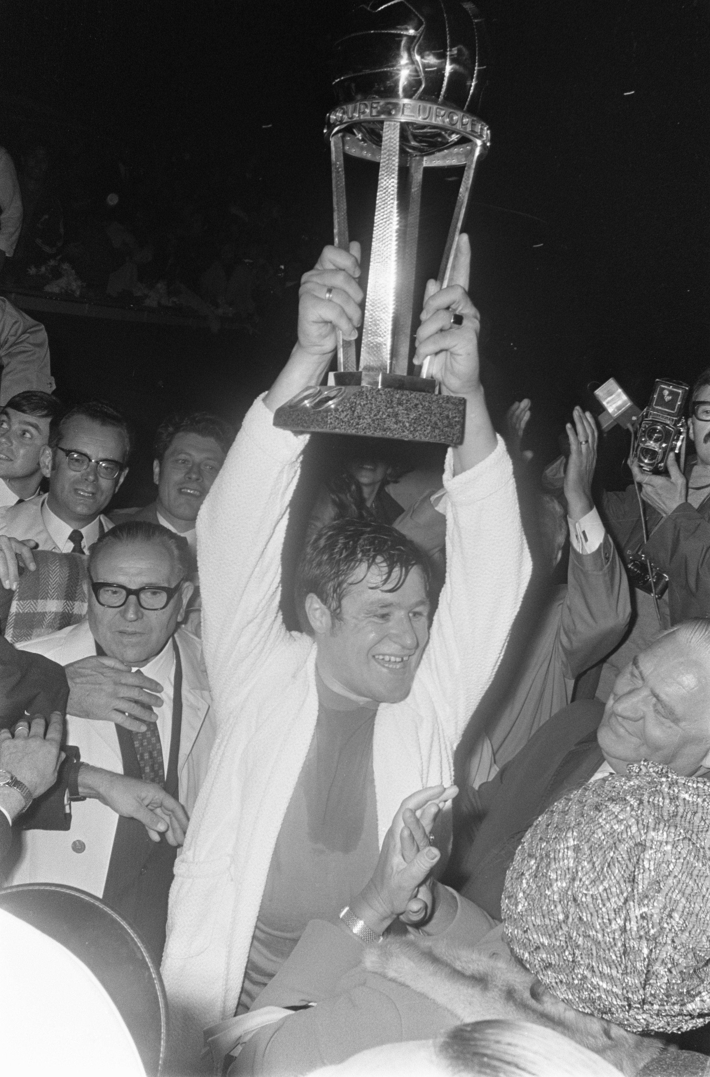 Collectie / Archief : Fotocollectie Anefo Reportage / Serie : [ onbekend ] Beschrijving : Feijenoord tegen Estudiantes 1-0; Feijenoord wint World beker ; Israel juichend met beker Datum : 9 september 1970 Trefwoorden : bekers, sport, voetbal Instellingsnaam : Feyenoord Fotograaf : Koch, Eric / Anefo Auteursrechthebbende : Nationaal Archief Materiaalsoort : Negatief (zwart/wit) Nummer archiefinventaris : bekijk toegang 2.24.01.05 Bestanddeelnummer : 923-8316